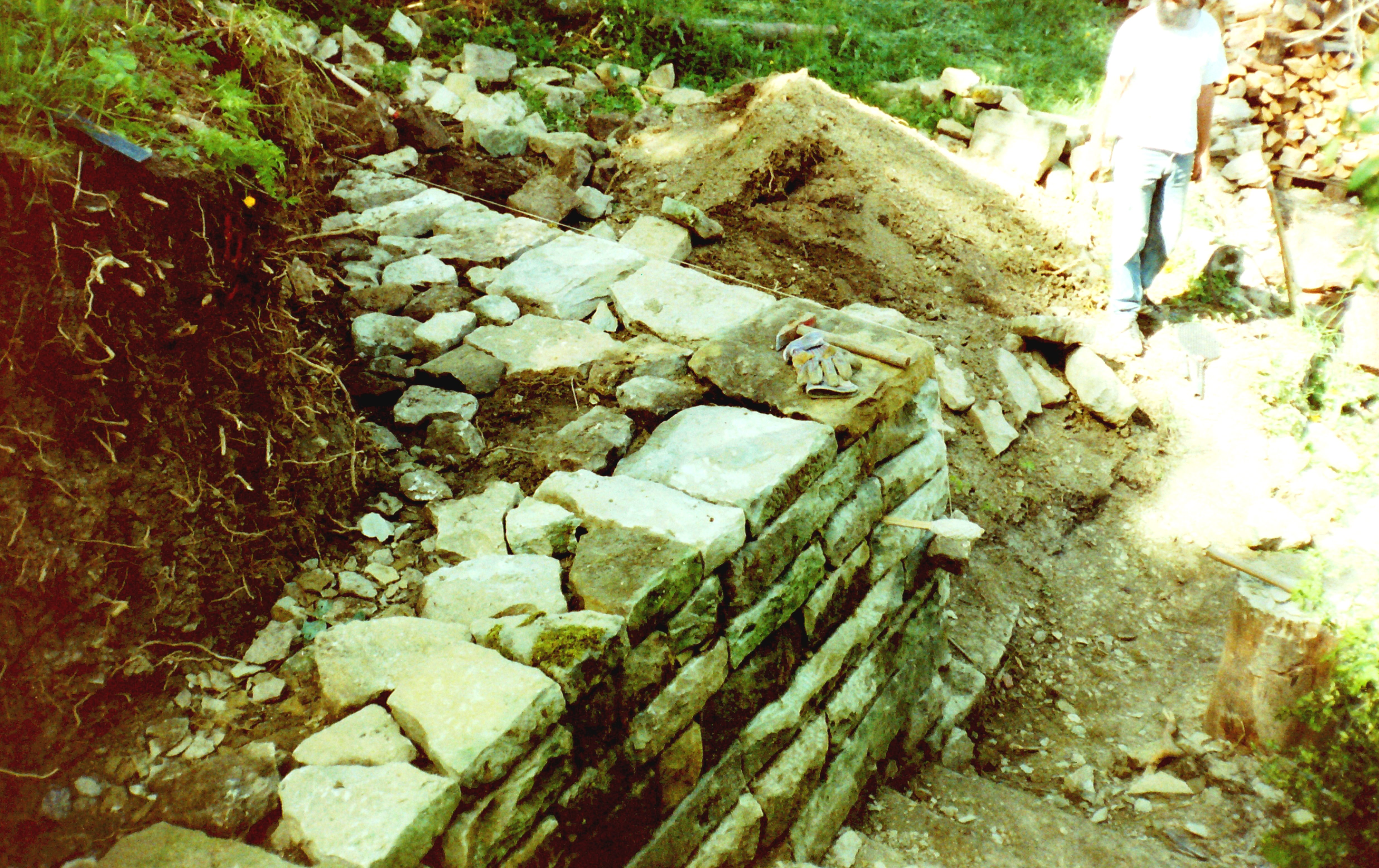 Trier-Kersch; Hospitalstraße. Bau einer Trockenmauer mit Hinterschlag (Hintermauerung). Aufnahme von 1991.